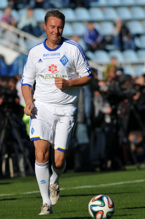 Олександр Хацкевич на Матчі пам'яті Белькевича, Баля і Гусіна